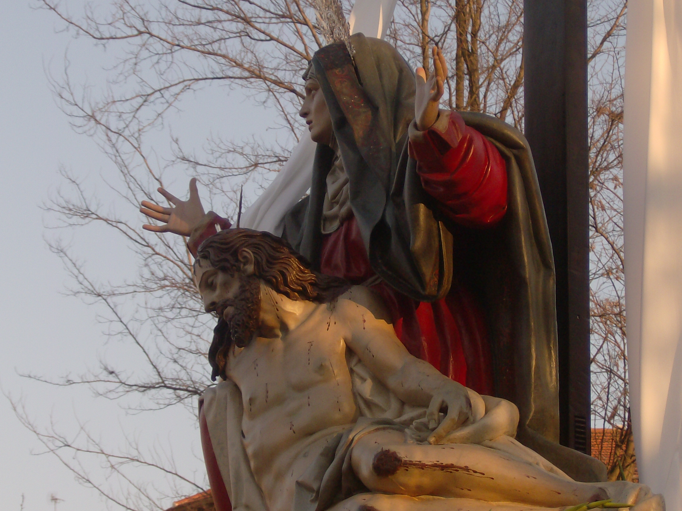 La Quinta Angustia (Gregorio Fernandez)